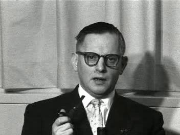 Evert Vermeer in 1959